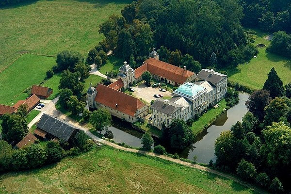 Luftbild von Schloss Stapel in Havixbeck